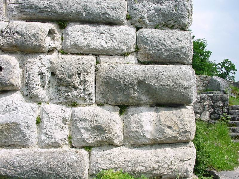 Hohengundelfingen public domain, eigenes Foto von 2003. Buckelquader des Bergfriedes Mewes 20:29, 6. Feb 2005 (CET)